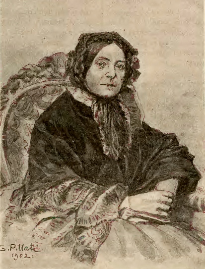 Eleonora Ziemięcka